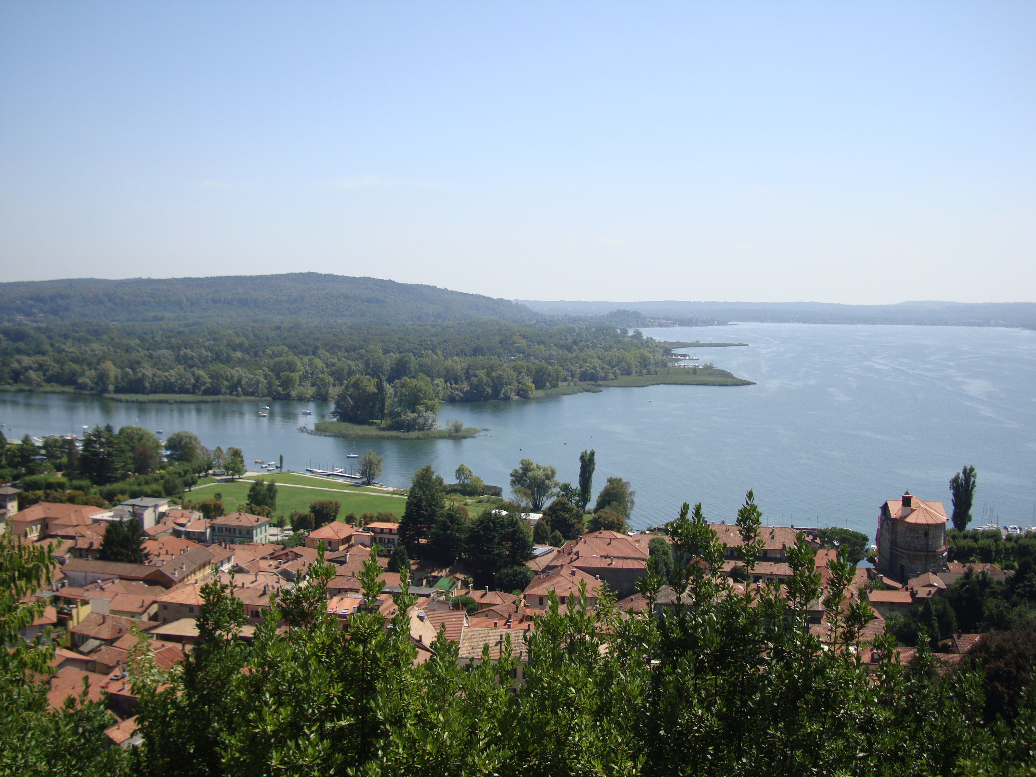 Panorama di Angera